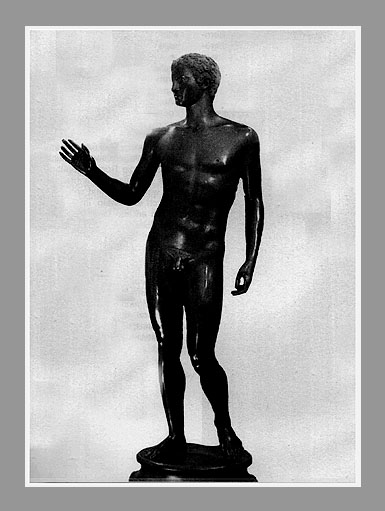 A Magdalensbergi Ifjú bronzszobra